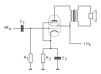 Schematische Darstellung eines Eintakt NF-Röhrenverstärkers